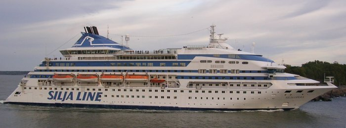 M/S Silja Opera passing through the Kustaanmiekka straight outside Helsinki.